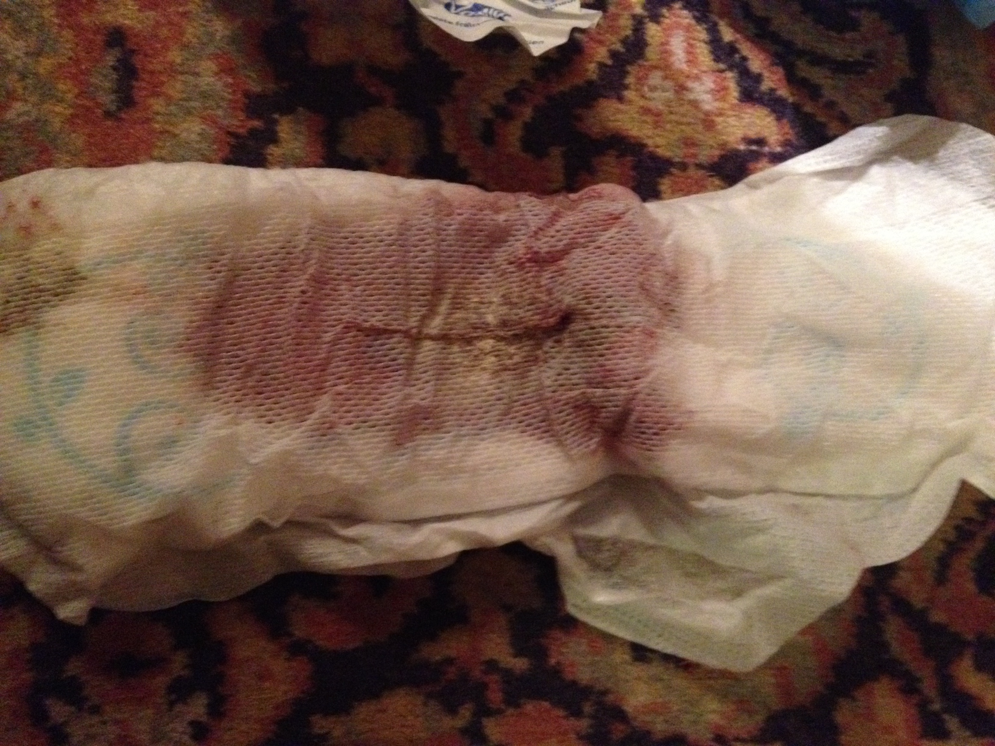 Protections hygiéniques usagées